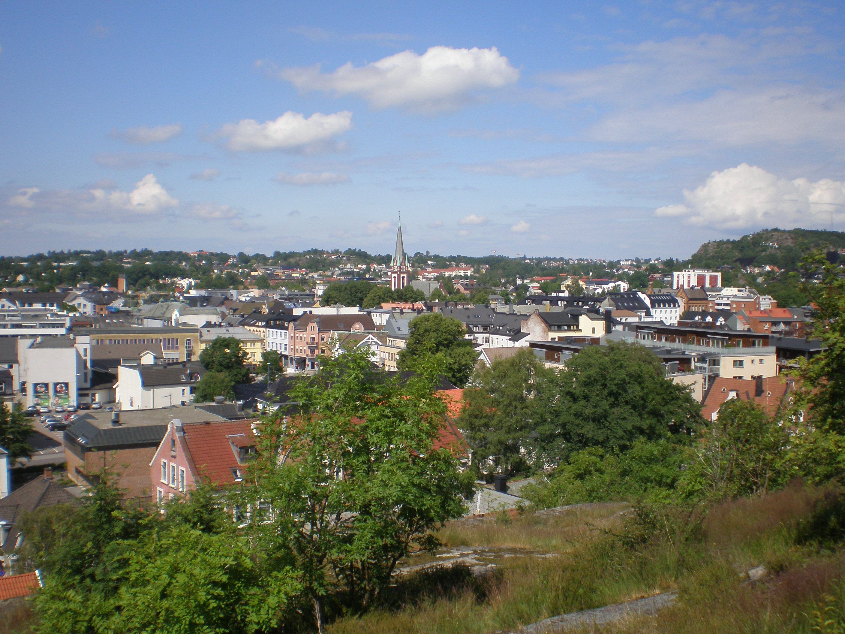 Sandefjord, Norwegia